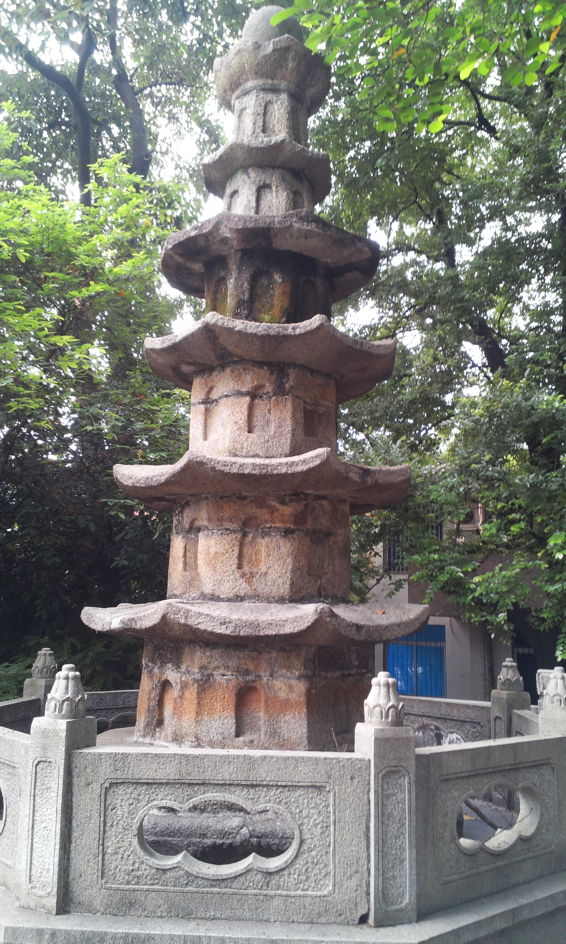 位於會城鎮馬山